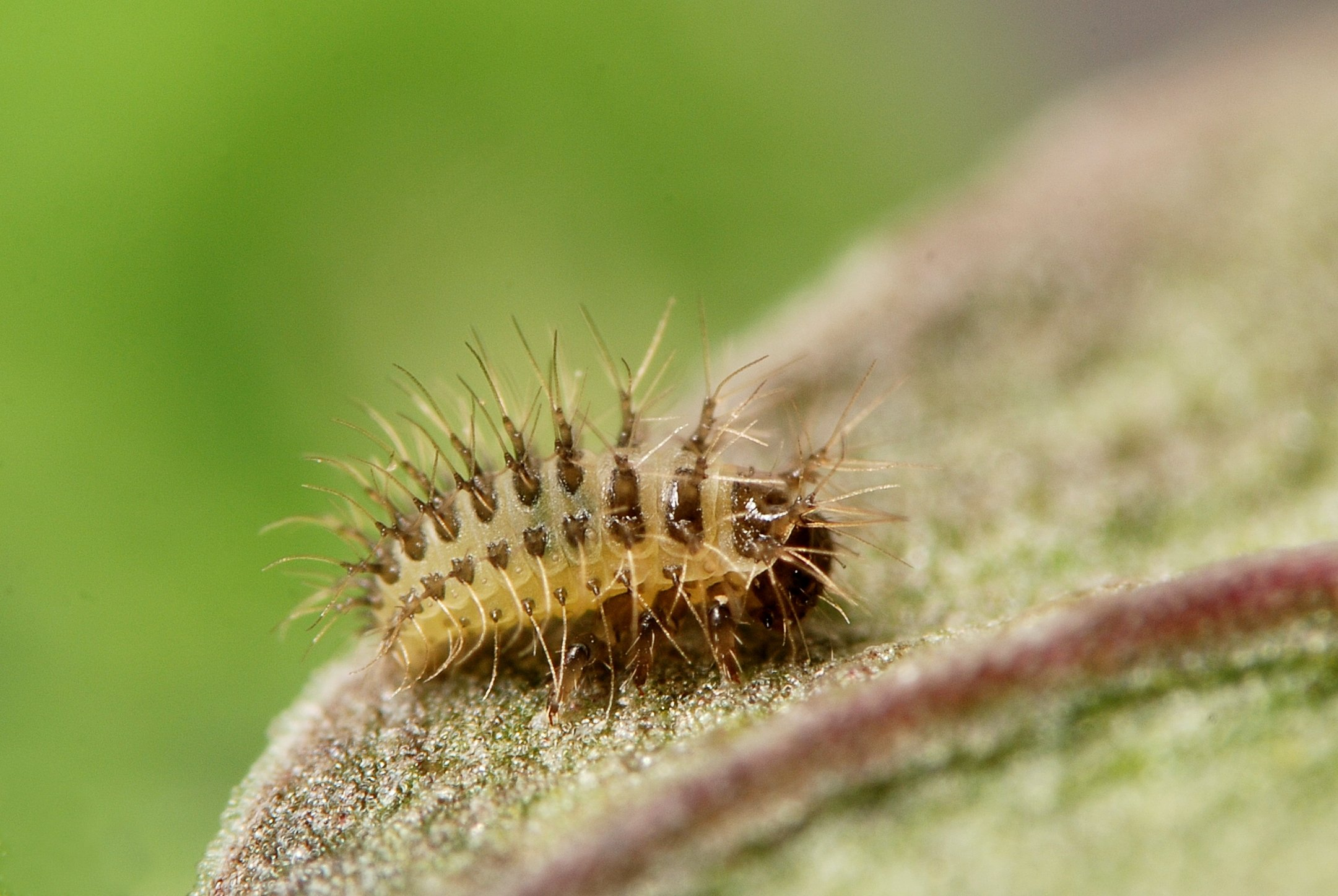 Vierundzwanzigpunkt-Marienkäfer-Larve (Subcoccinella vigintiquatuorpunctata)